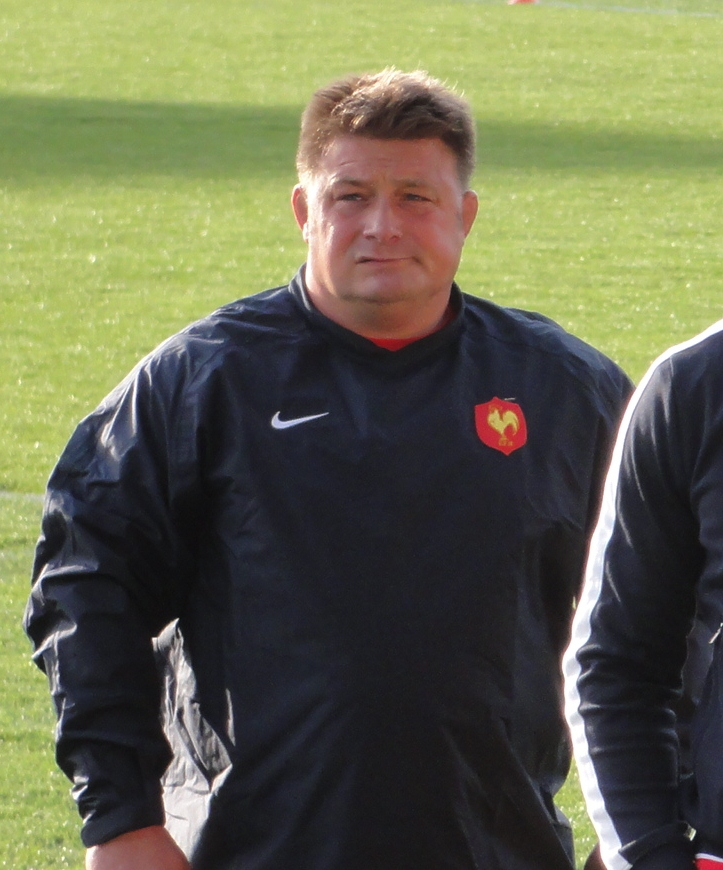 Didier Retière avant le match France-Japon lors de la coupe du monde 2011